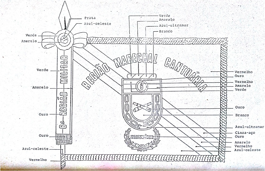 Estandarte Histórico da 6ª RM